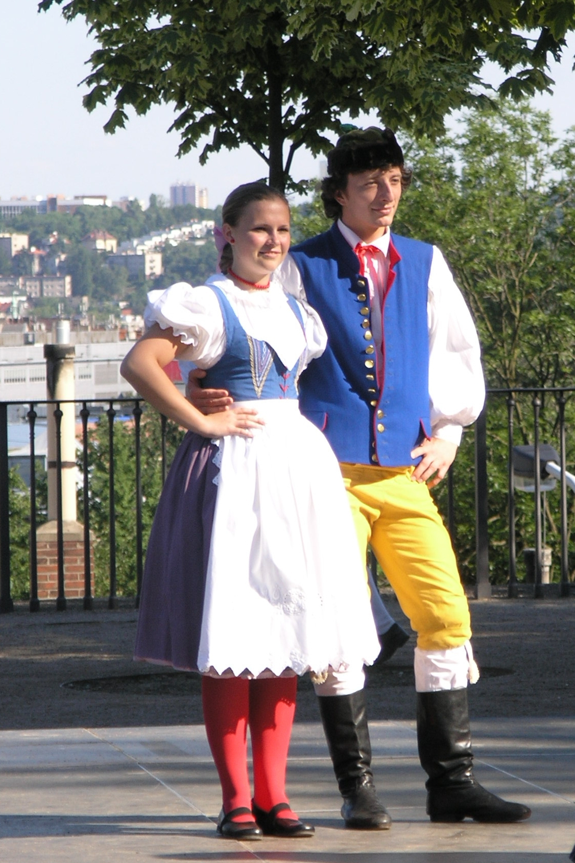 X. Národopisná slavnost v Kinského zahradě - Prácheňský soubor písní a tanců Strakonice